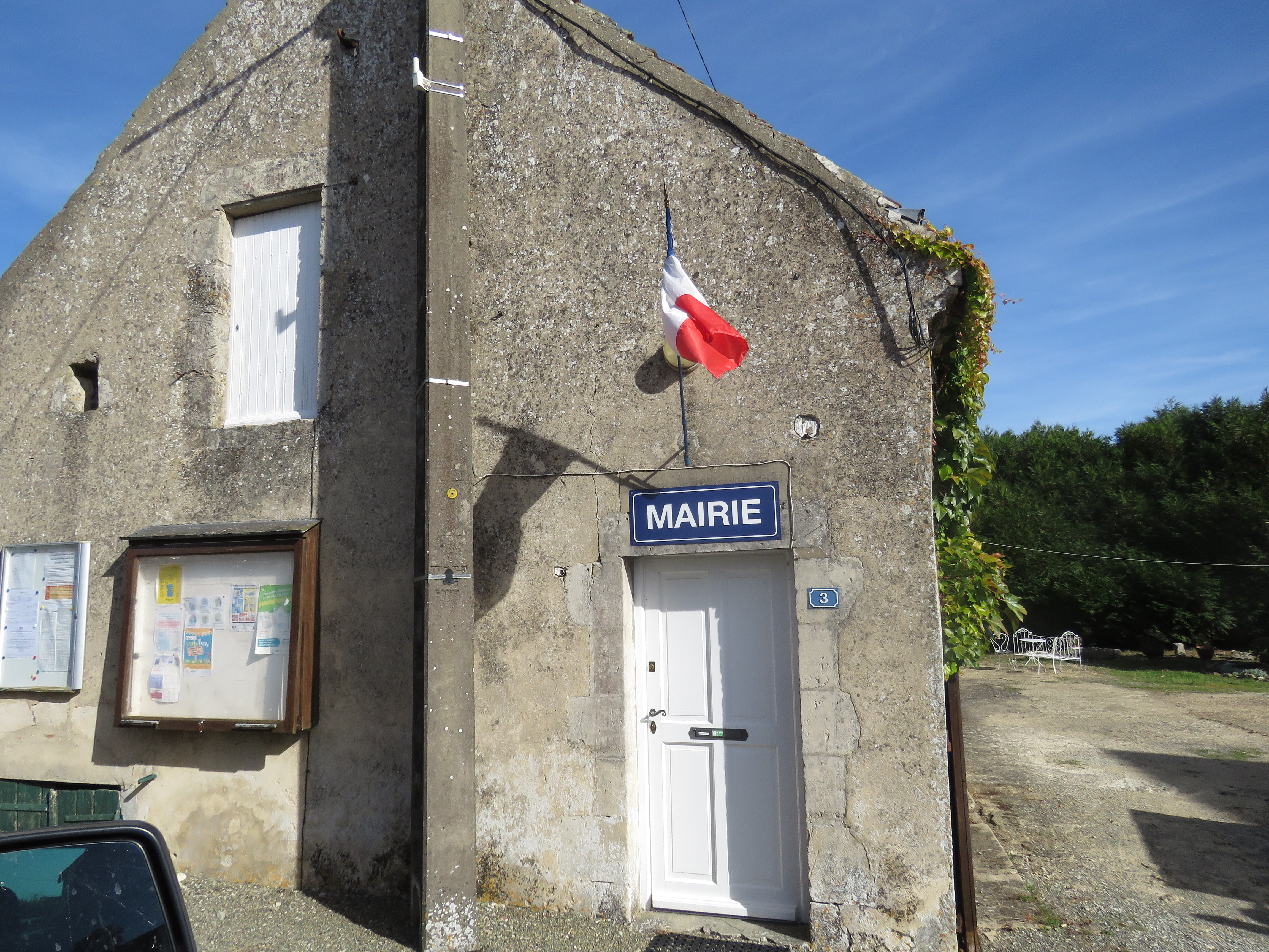 Mairie